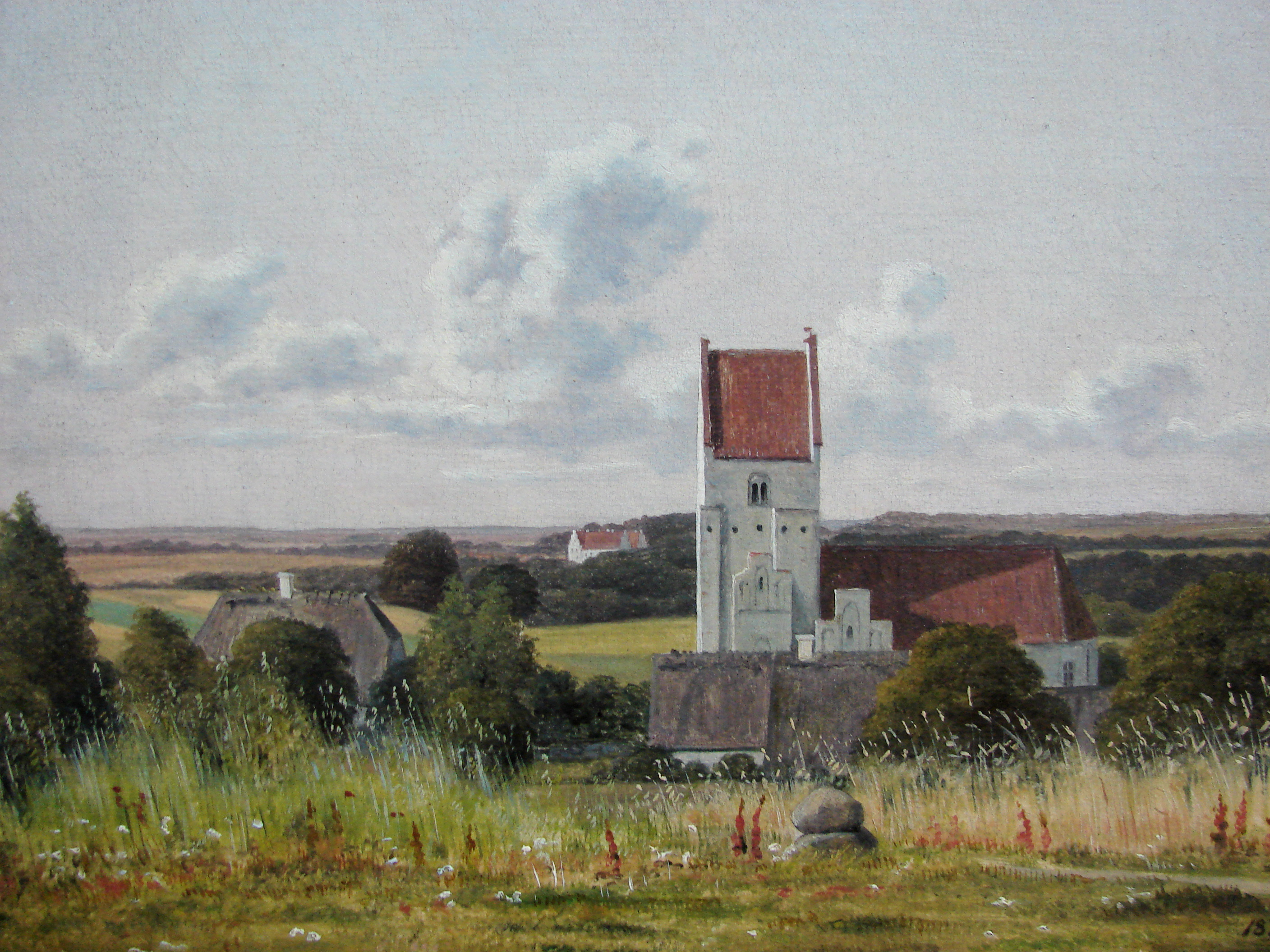 Vester Egede Kirke. I baggrunden Gisselfeld Kloster